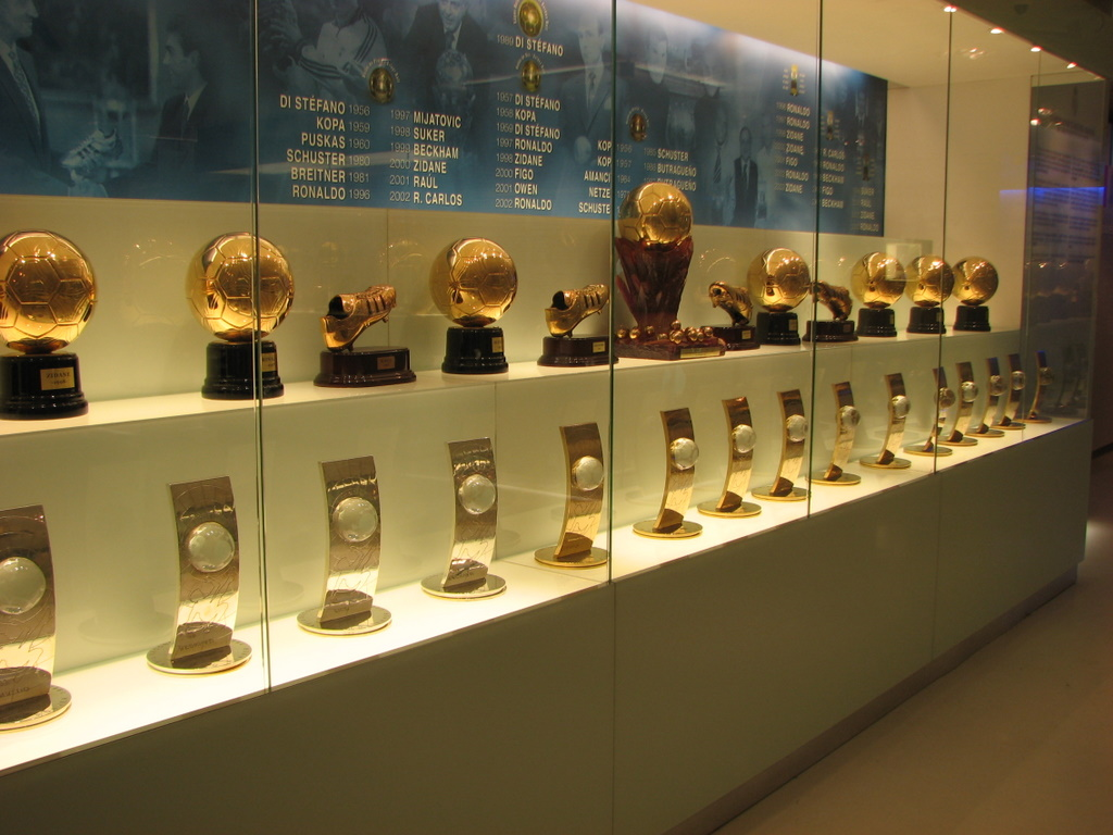 aquí tenían los balones y botines de oro de los jugadores del madrid... la de zidane, owen, etc, etc...